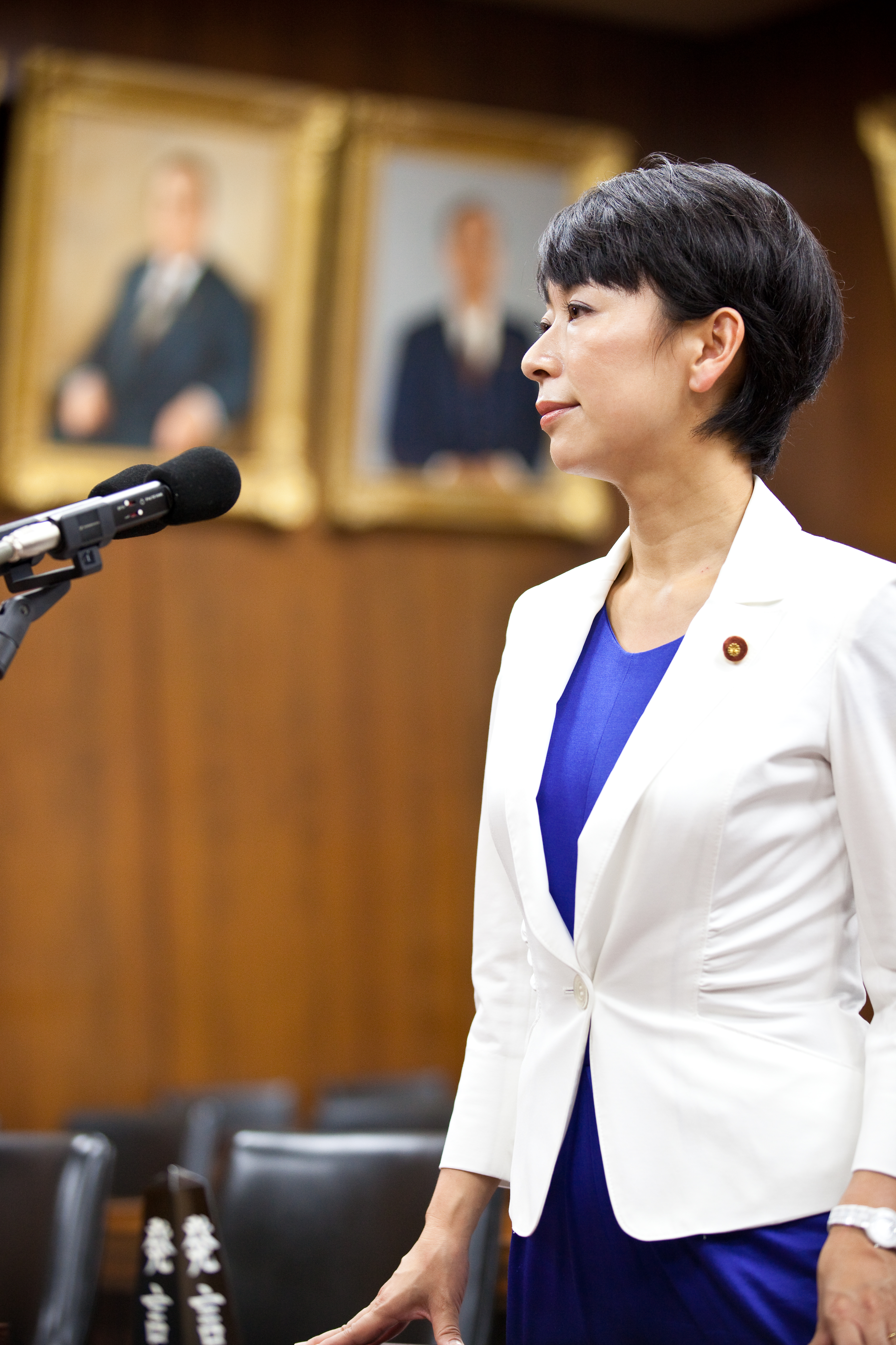 衆議院議員山尾志桜里